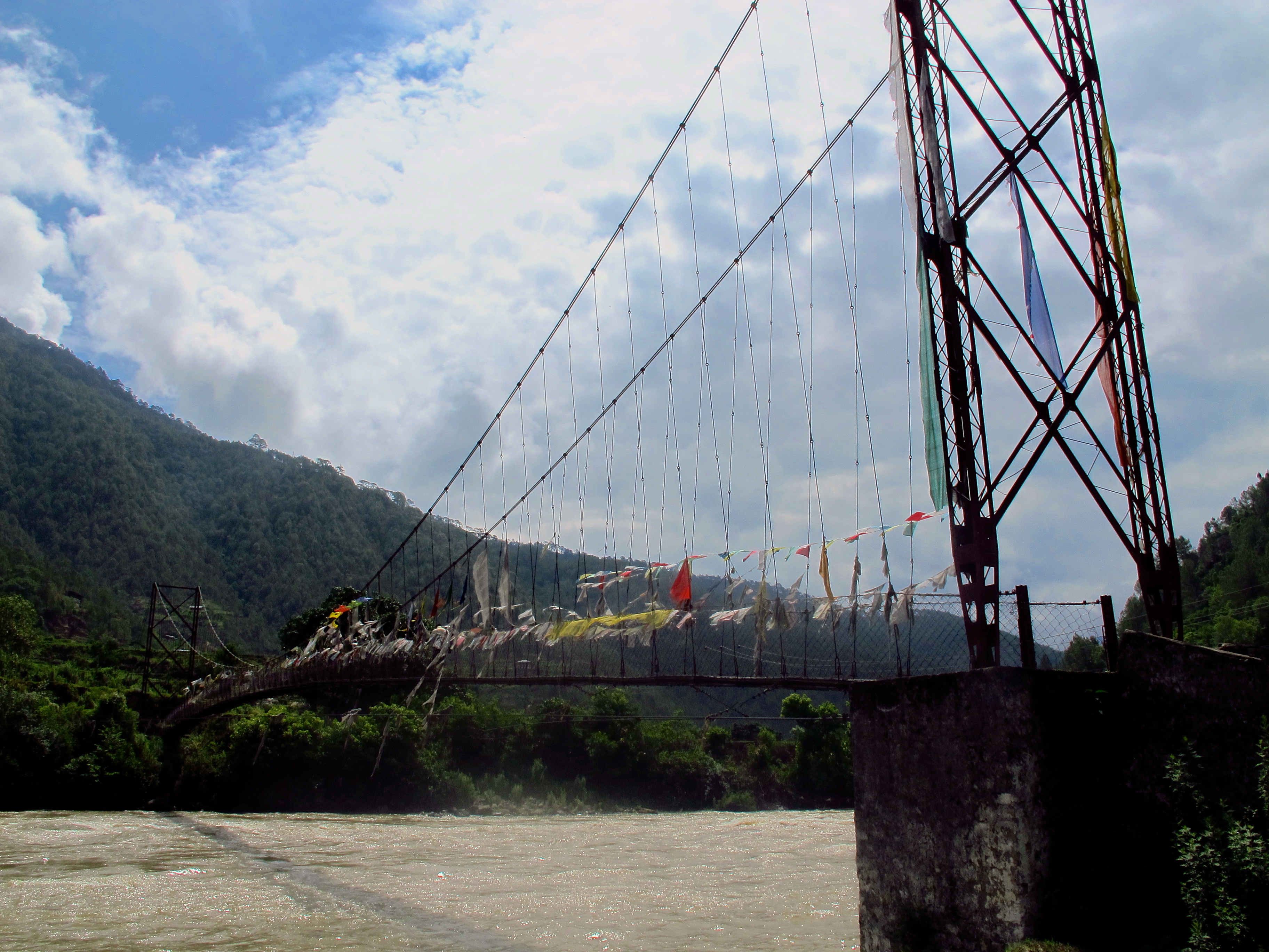 Kawang, Thimphu, BT